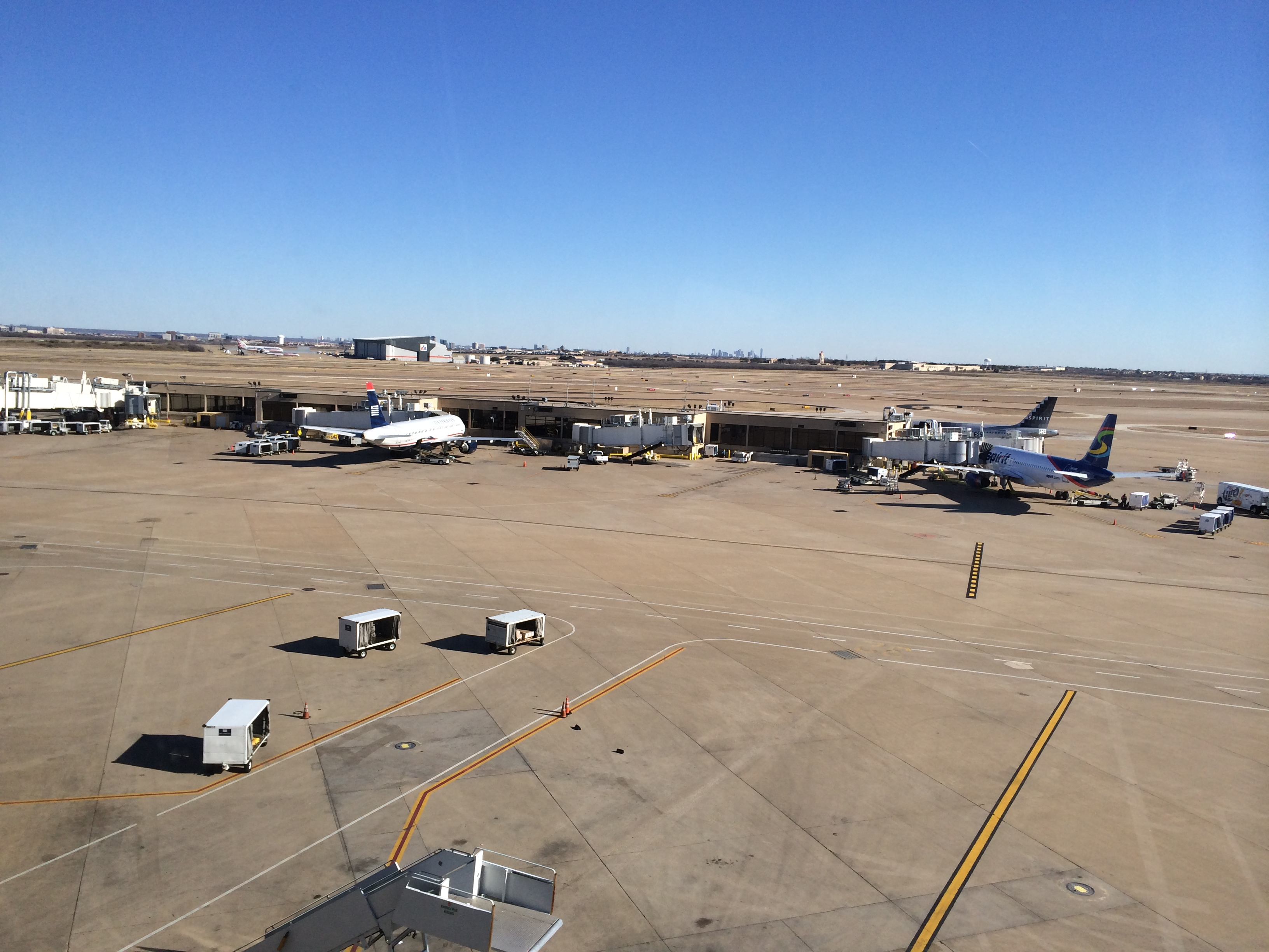 Terminal E del aeropuerto de DFW.